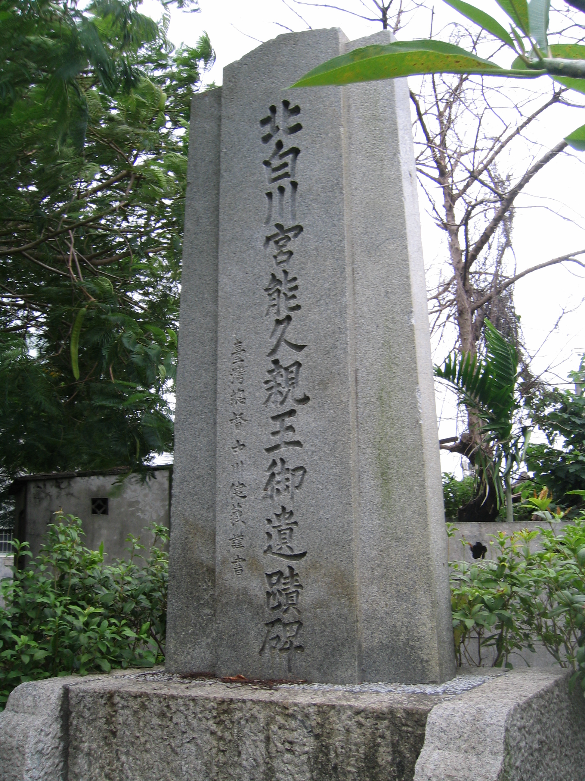 立於餘三館前的北白川宮能久親王遺蹟碑